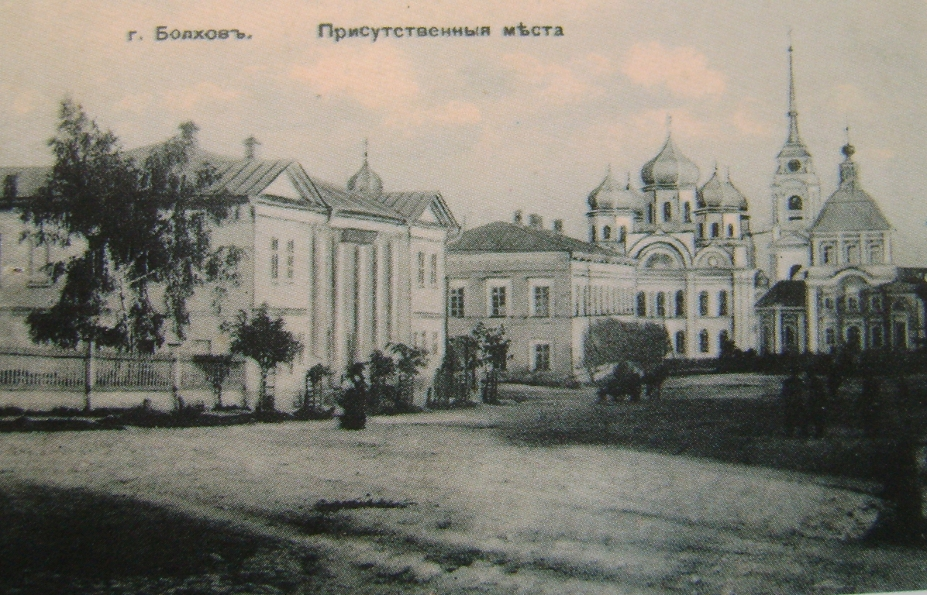 Открытка. Болхов. Присутственные места